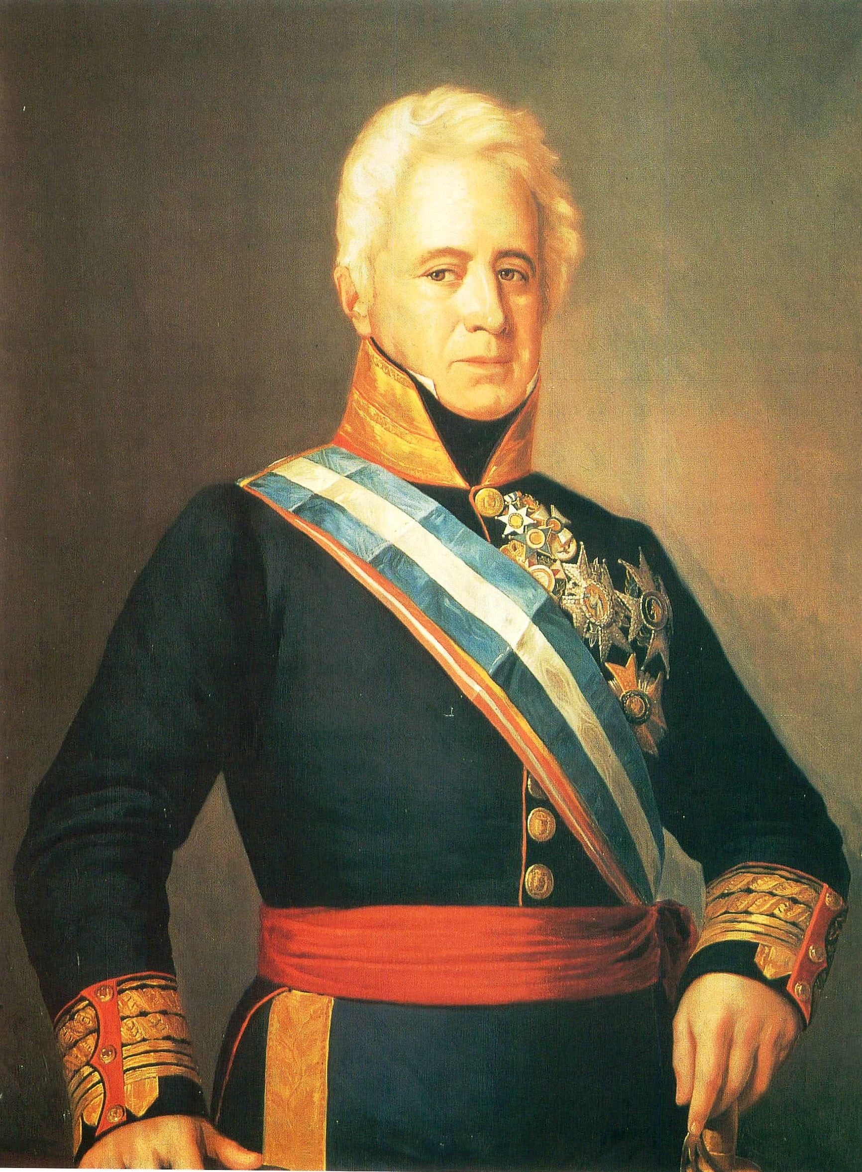 Retrato del militar y aristócrata español Pedro Agustín Girón (1778-1842), marqués de las Amarillas y primer duque de Ahumada.